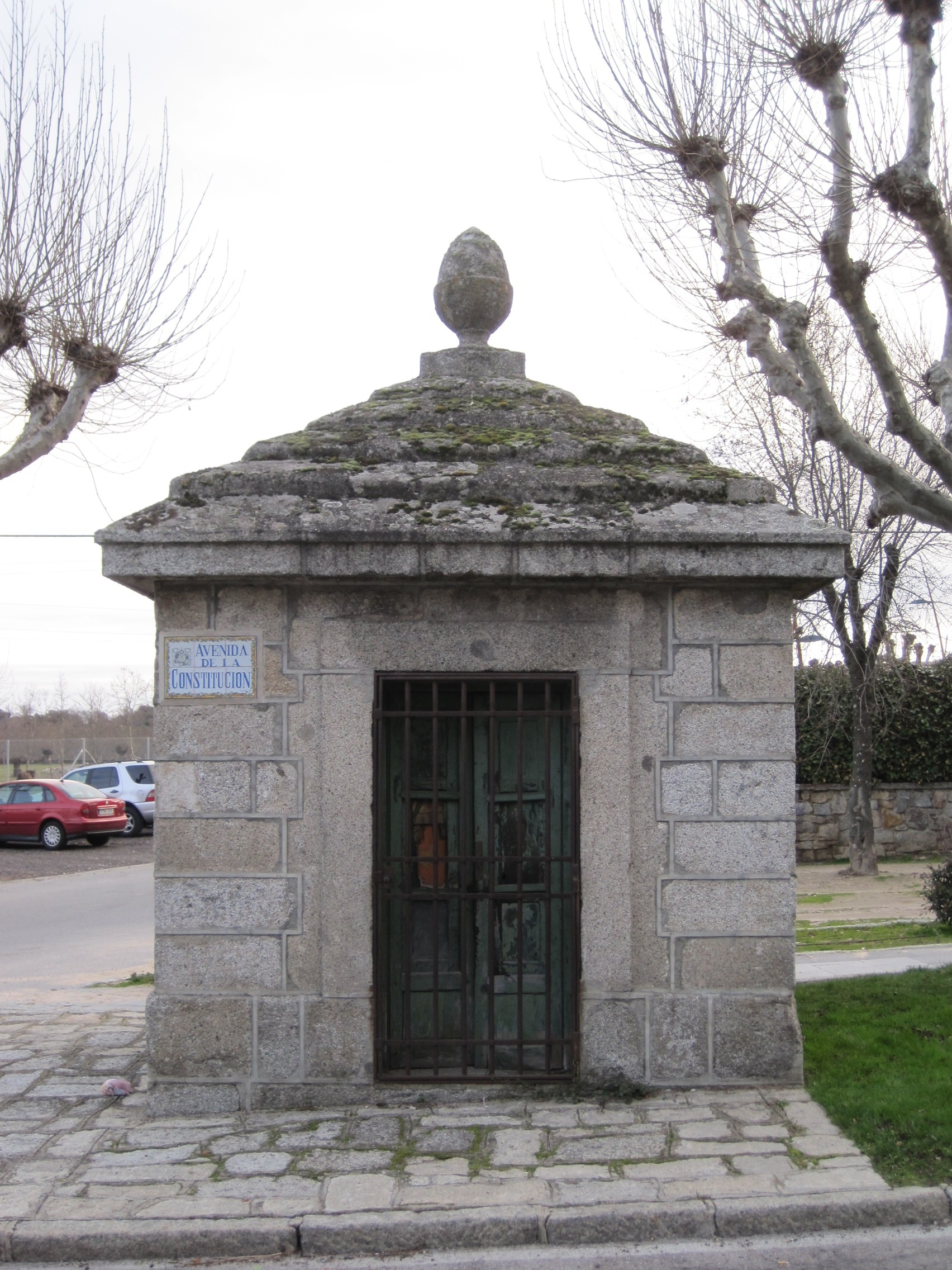 Arca de San Sebastián, en El Escorial (Madrid, España).